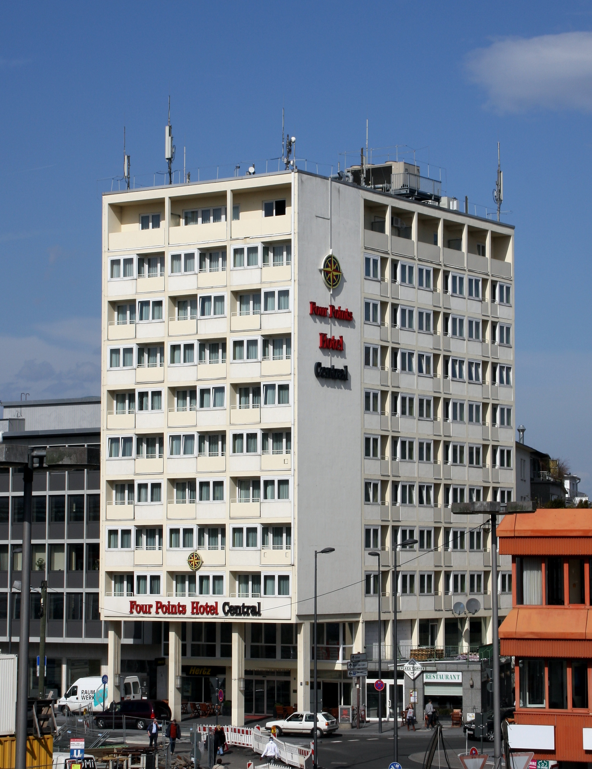 Four Points Hotel Central, Breslauer Platz 2, Köln. Architekt: Georg Schneider, Baujahr: 1956. Ehemals Hotel Baseler Hof. Quelle: Hagspiel, Wolfram; Kier, Hiltrud; Stadt Köln (Hrsg.): Köln: Architektur der 50er Jahre. J. P. Bachem Verlag, Köln 1986, ISBN 3-7616-0858-6.